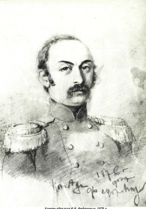 И. И. Фёдорович, контр-адмирал Российского императорского флота